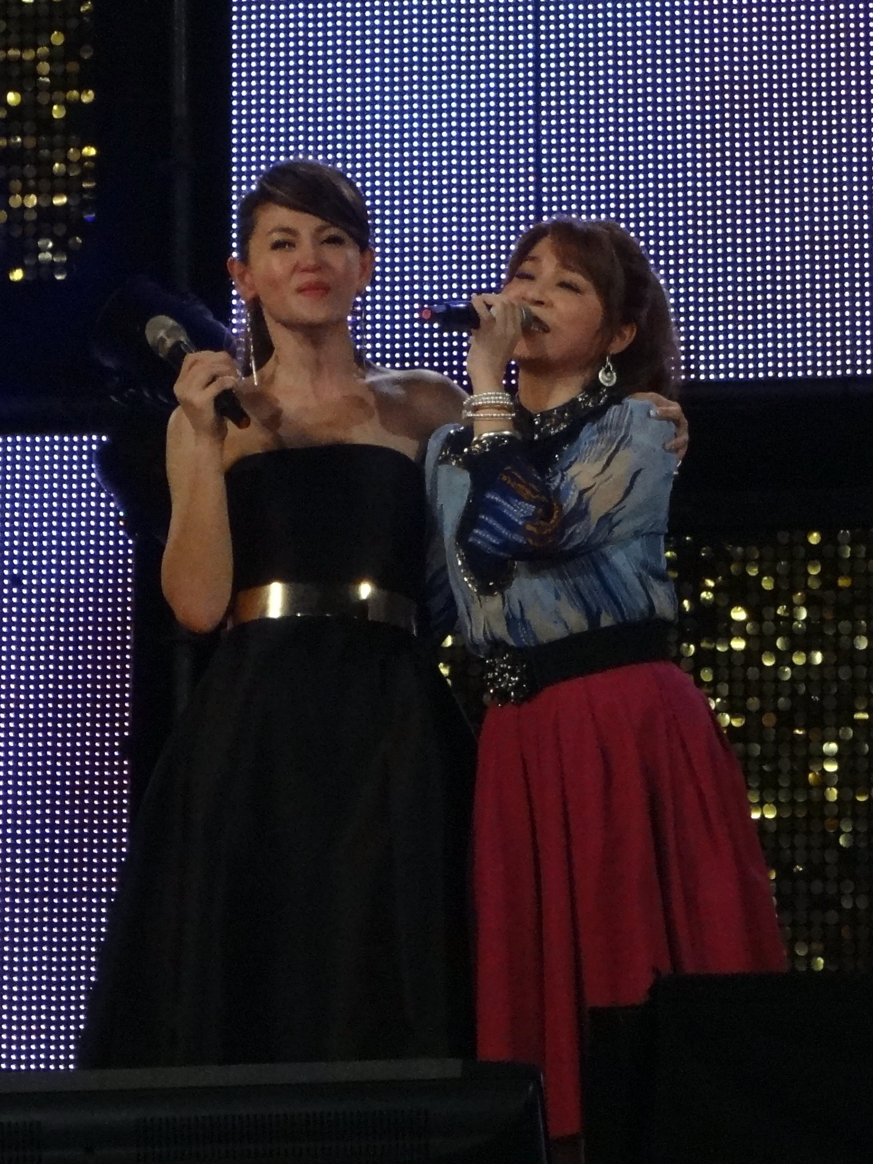 三立台灣台綜藝節目《超級夜總會》於基隆市七堵區堵南國民小學操場錄影中，第一段來賓鄭仲茵（左）、王彩樺（右）合唱〈感恩的心〉。